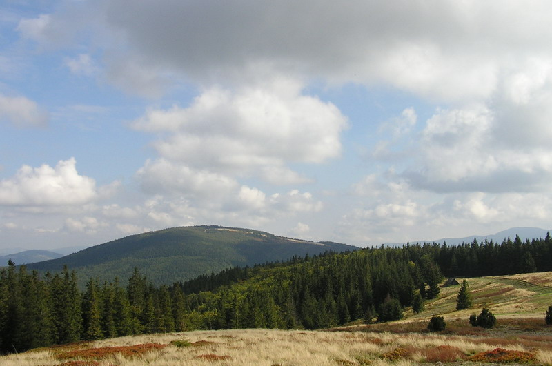 Widok z hali Lachów Gronia (Beskid Żywiecki) na Jałowiec 1111 m n.p.m.